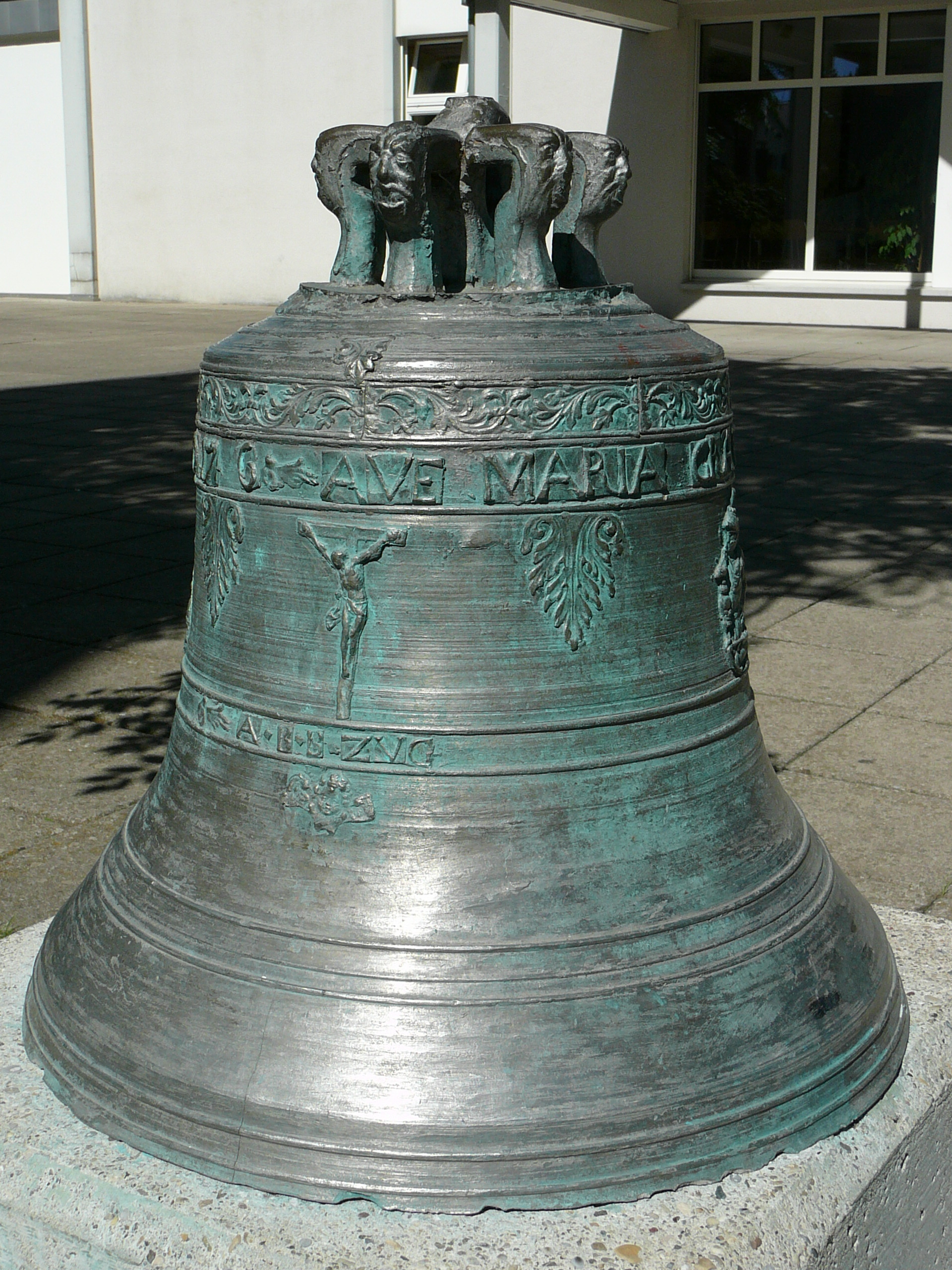 Römisch-katholische Kirche Niederhasli, Glocke